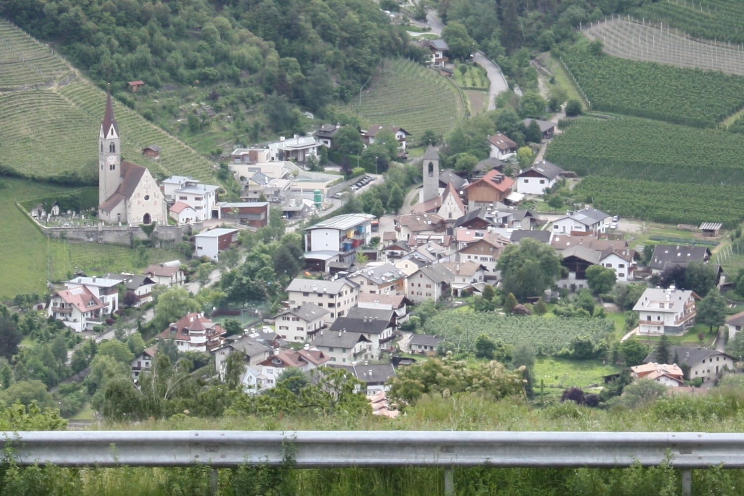 Brixen, Südtirol: Ansicht der Fraktion Albeins